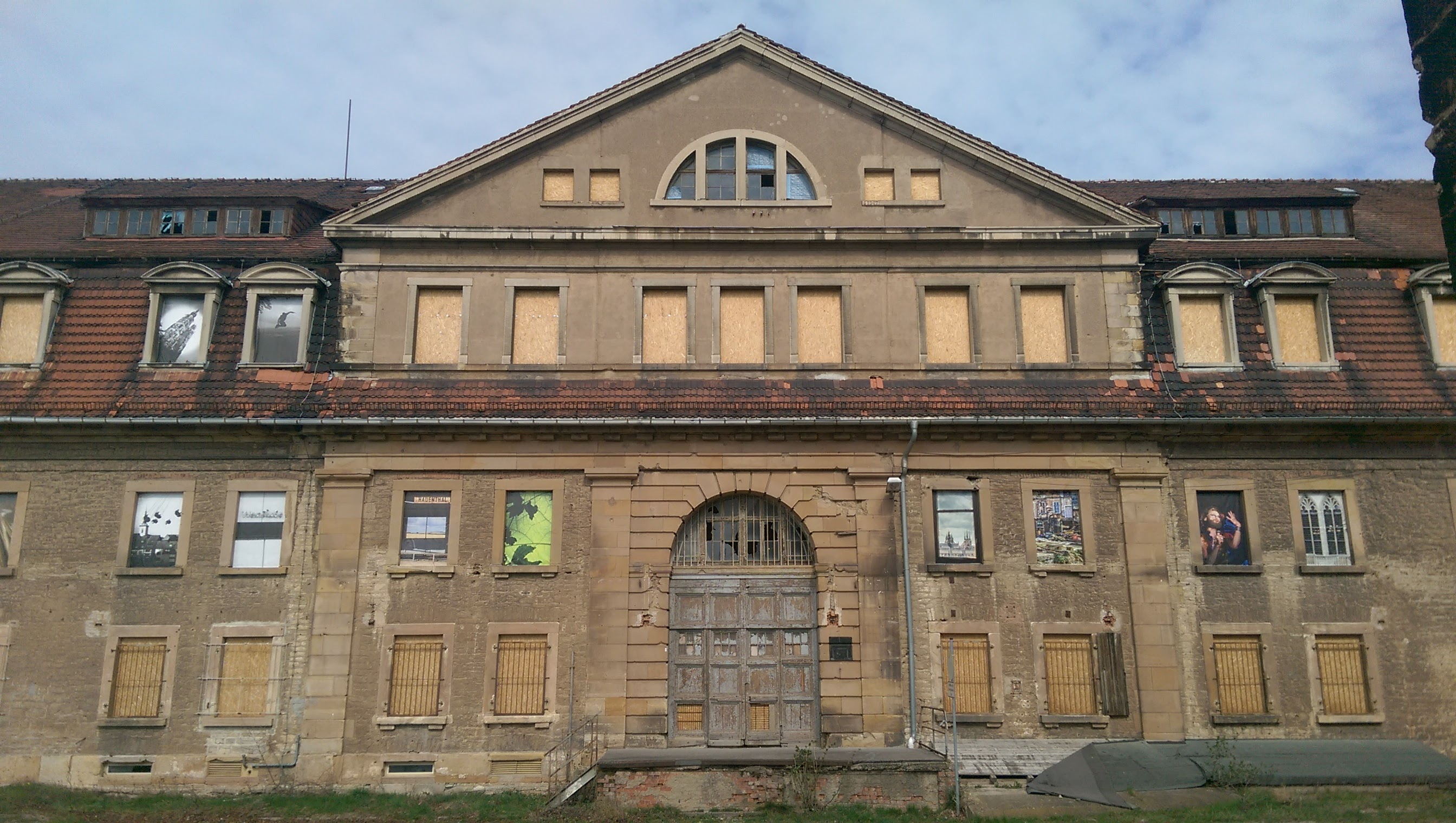 Defensionskaserne Erfurt (2016)